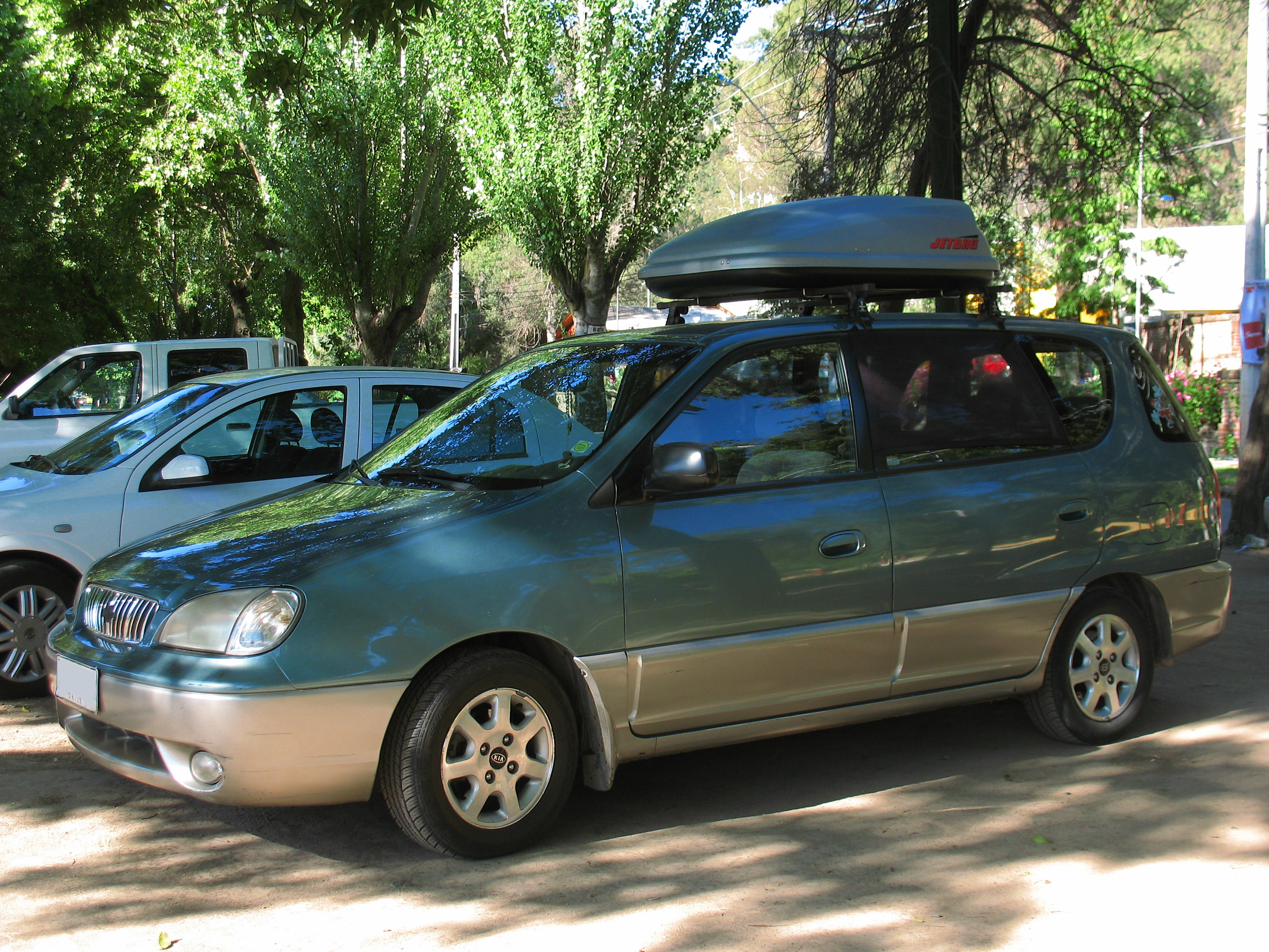 Kia Carens 1.8 LX 2000